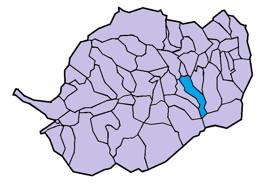 Taurinyà en el Conflent, a partir del mapa municipal del Conflent de lliure disposició adaptat al Nomenclàtor toponímic aprovat el 2007